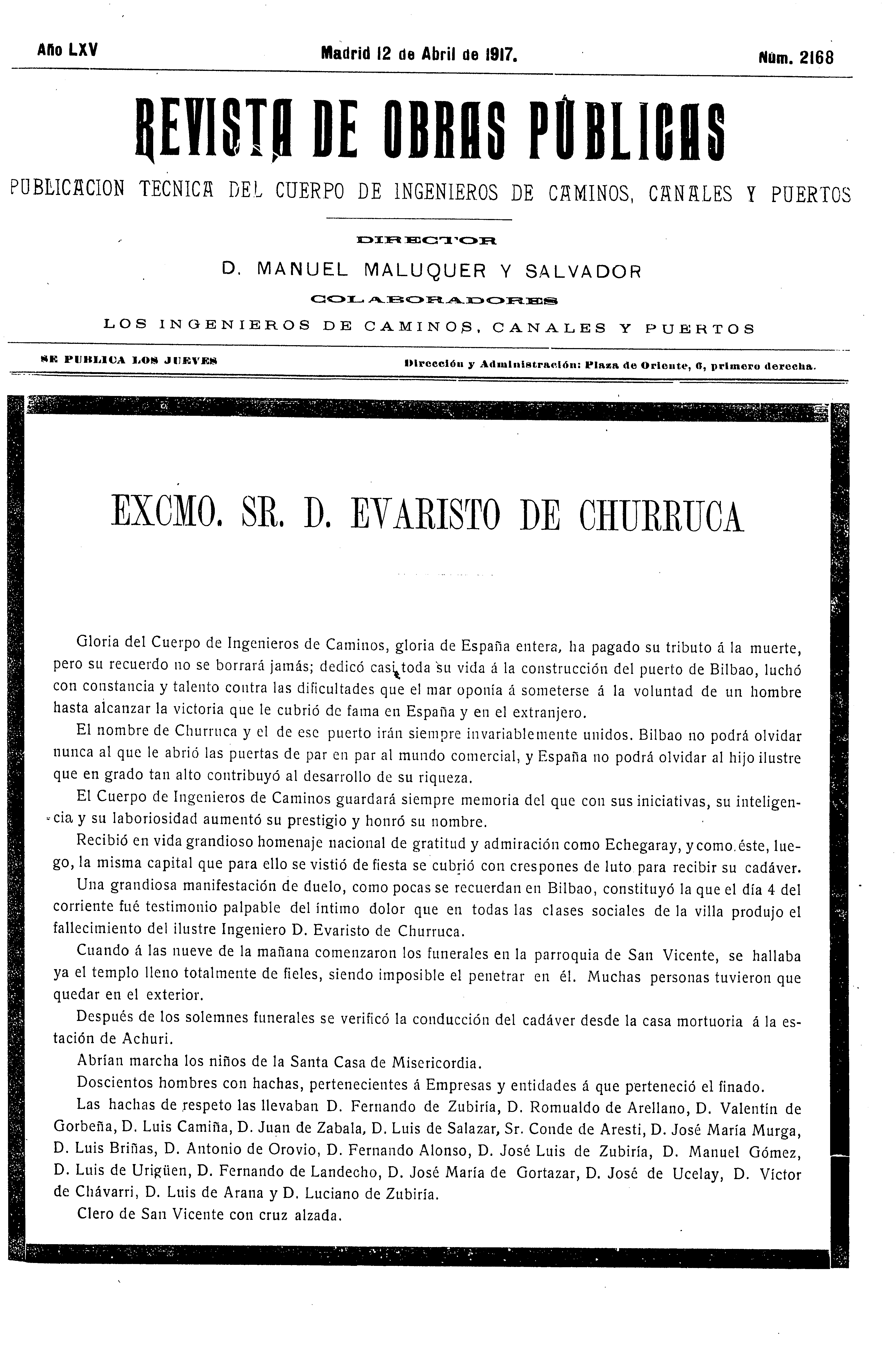 Obituario de Evaristo de Churruca en la Revista de Obras Públicas